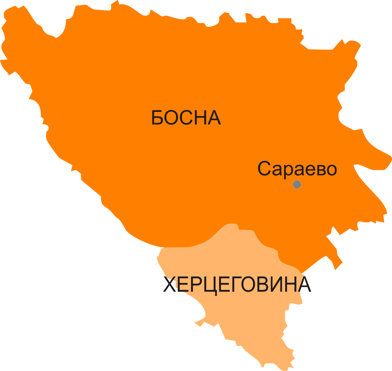 Карта на историческата област Босна